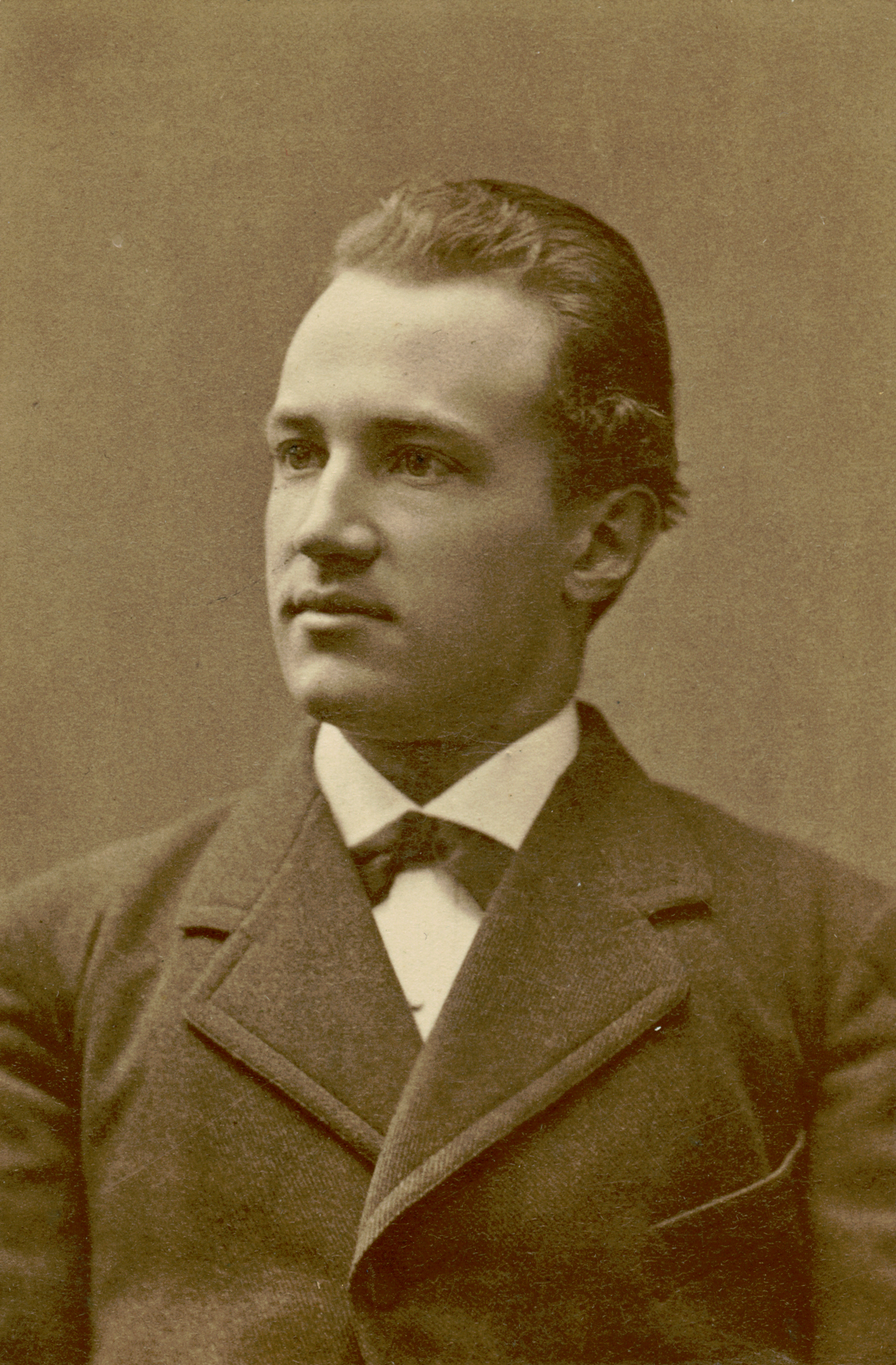 Skådespelaren Albion Örtengren vid Nya teatern 1879